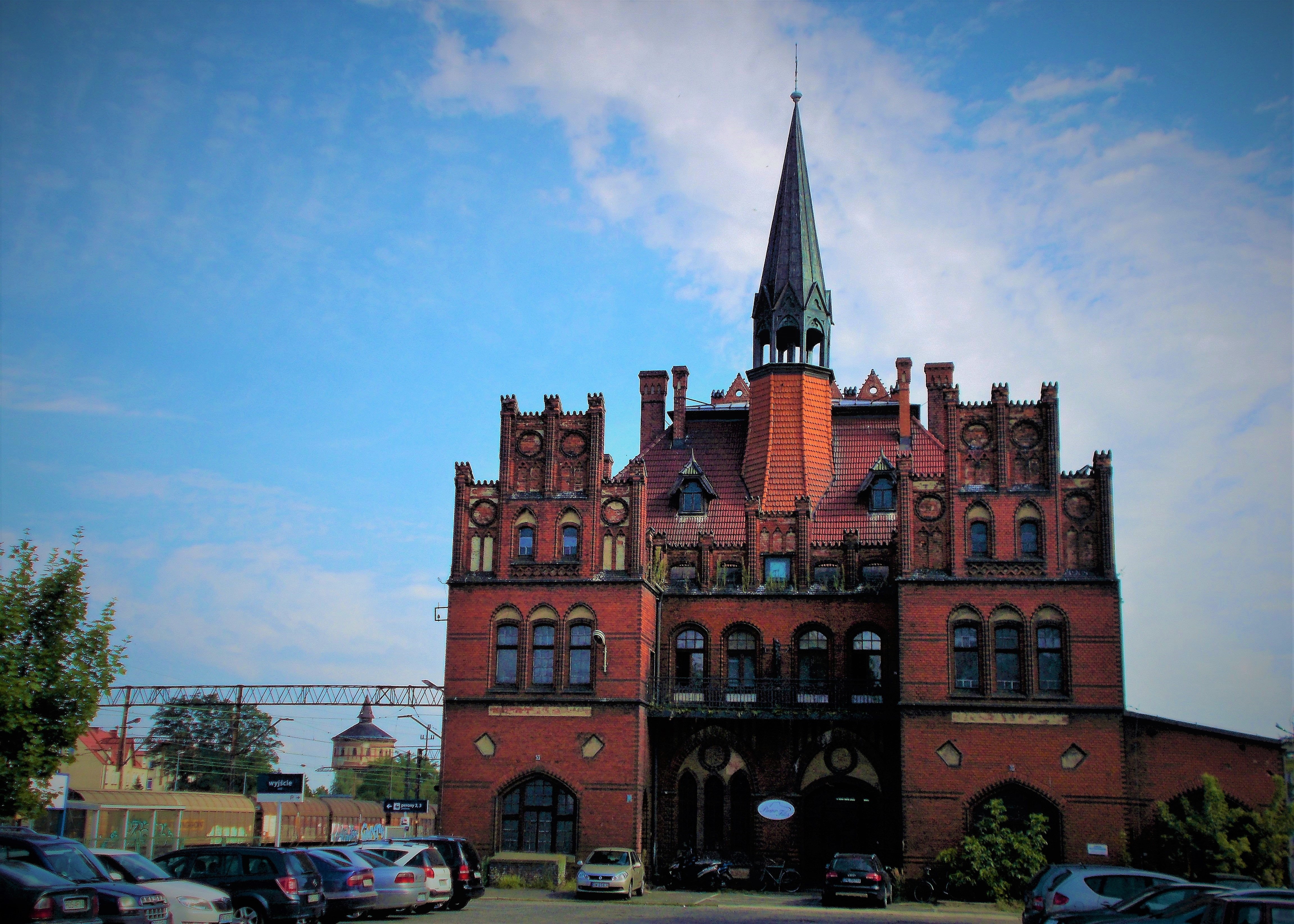 Dworzec kolejowy w Nowych Skalmierzycach